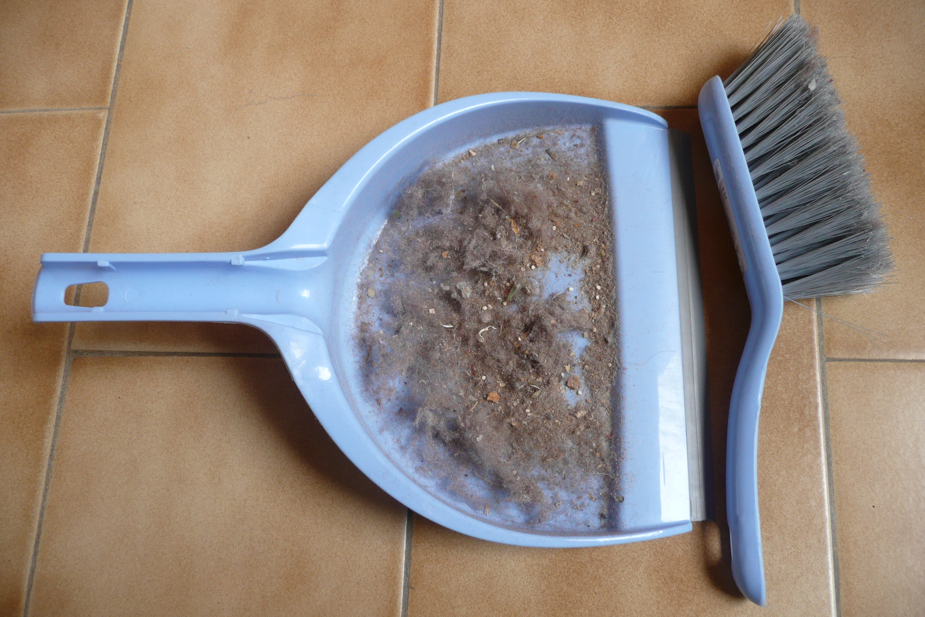 Poussière de maison.